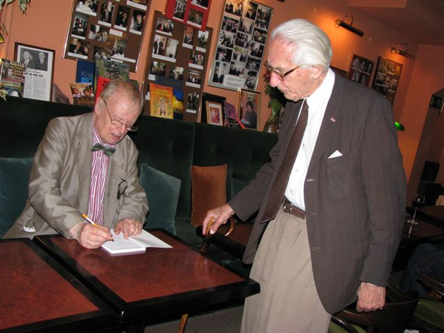 Left Maciej Morawski (b. September 20, 1929 in Poznań, Poland), a Polish journalist (Radio Free Europe) and Zygmunt Skórzyński (b. 1923), a sociologist from Poland.